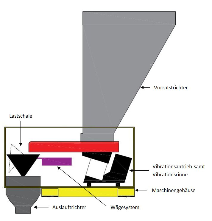 Allgemeiner Aufbau einer Abfüllwaage.